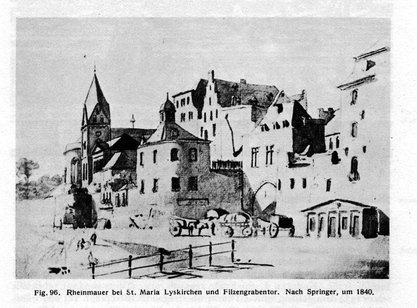 Kölner Rheinmauer bei St. Maria Lyskirchen. Nach Norden folgt das Filzengraben- und das Rheingassentor. Darstellung, Springer 1840